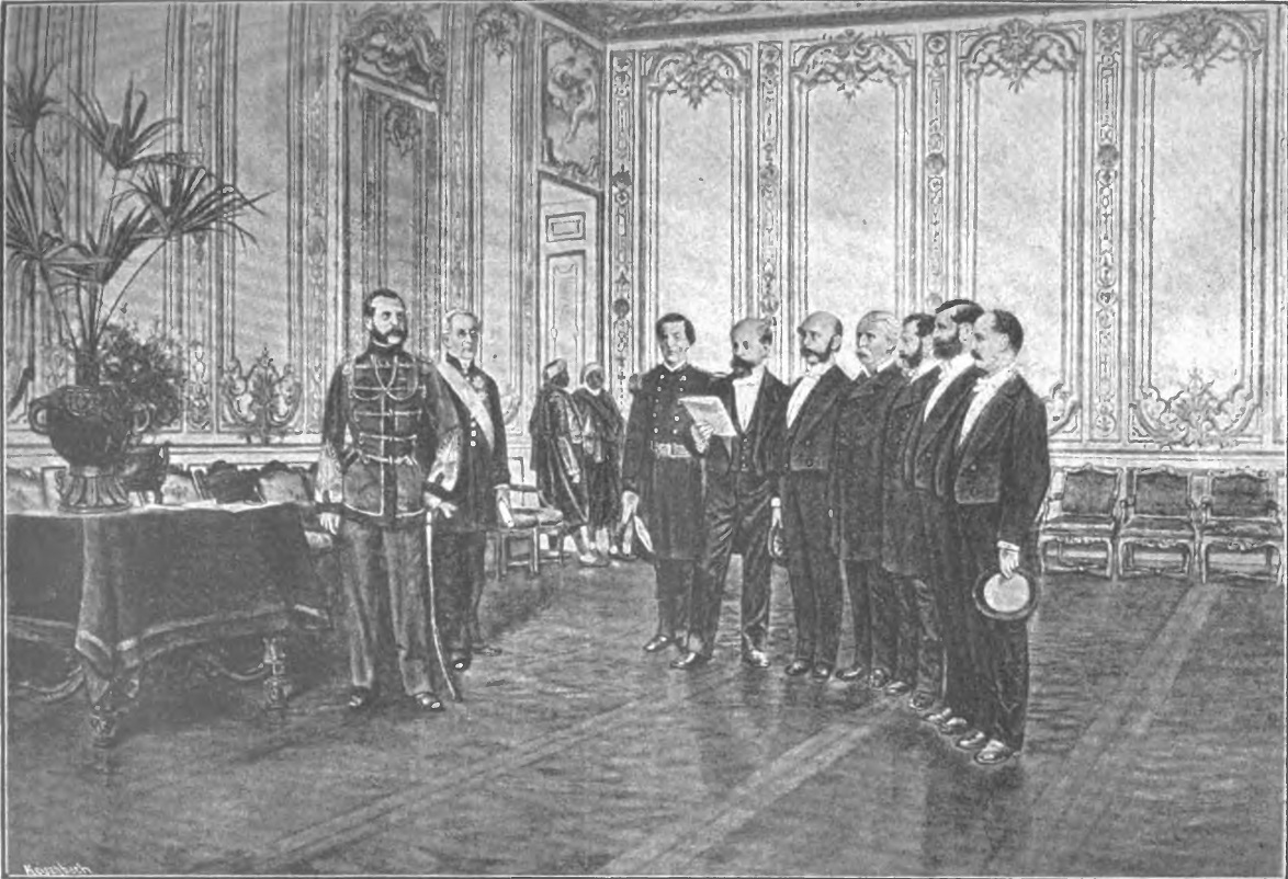 Аудиенция Густава Фокса у императора Александра II (Санкт-Петербург).